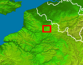 Map showing location of Cambrésis region in France Carte montrant la situation du Cambrésis, France